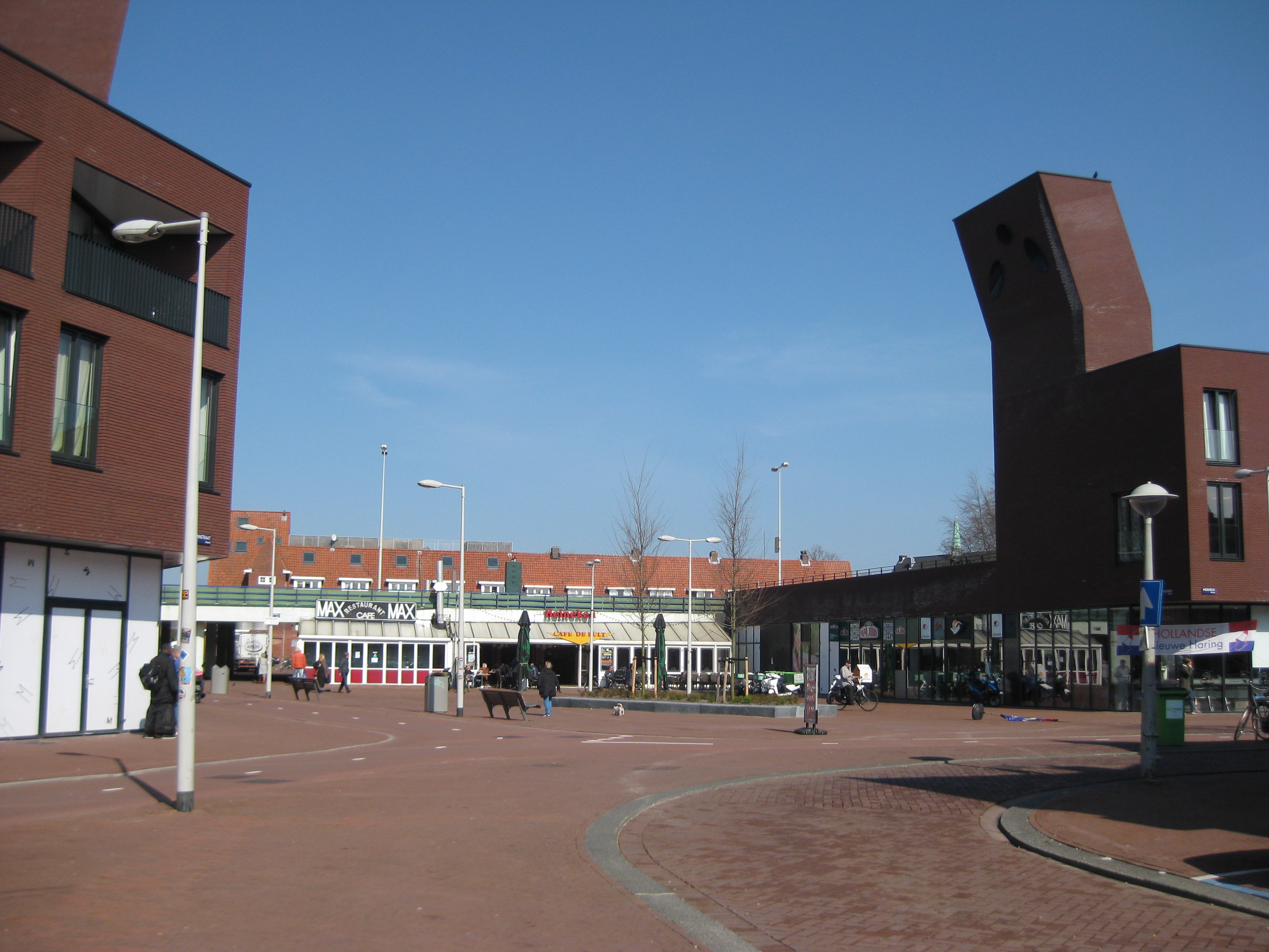 Mosveld, Amsterdam, met brug 437; de onderdoorgang links